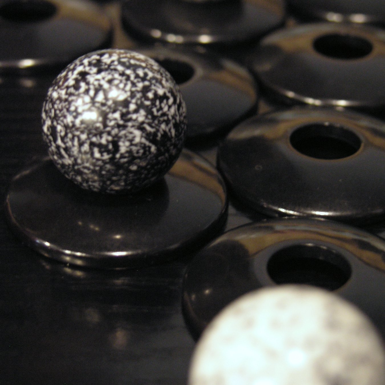 ZÈRTZ